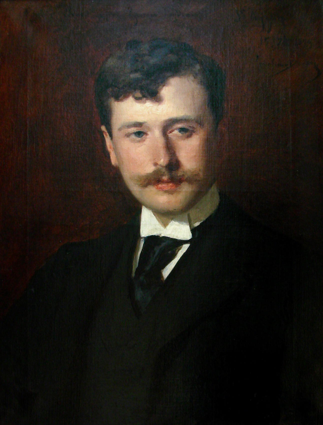 Portrait de Georges Feydeau, auteur dramatique, par Carolus-Duran (1837-1917). Musée des Beaux-Arts de Lille.